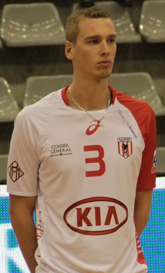 Kevin Le Roux sous les couleurs de l'AS Cannes lors de la saison 2012-2013.